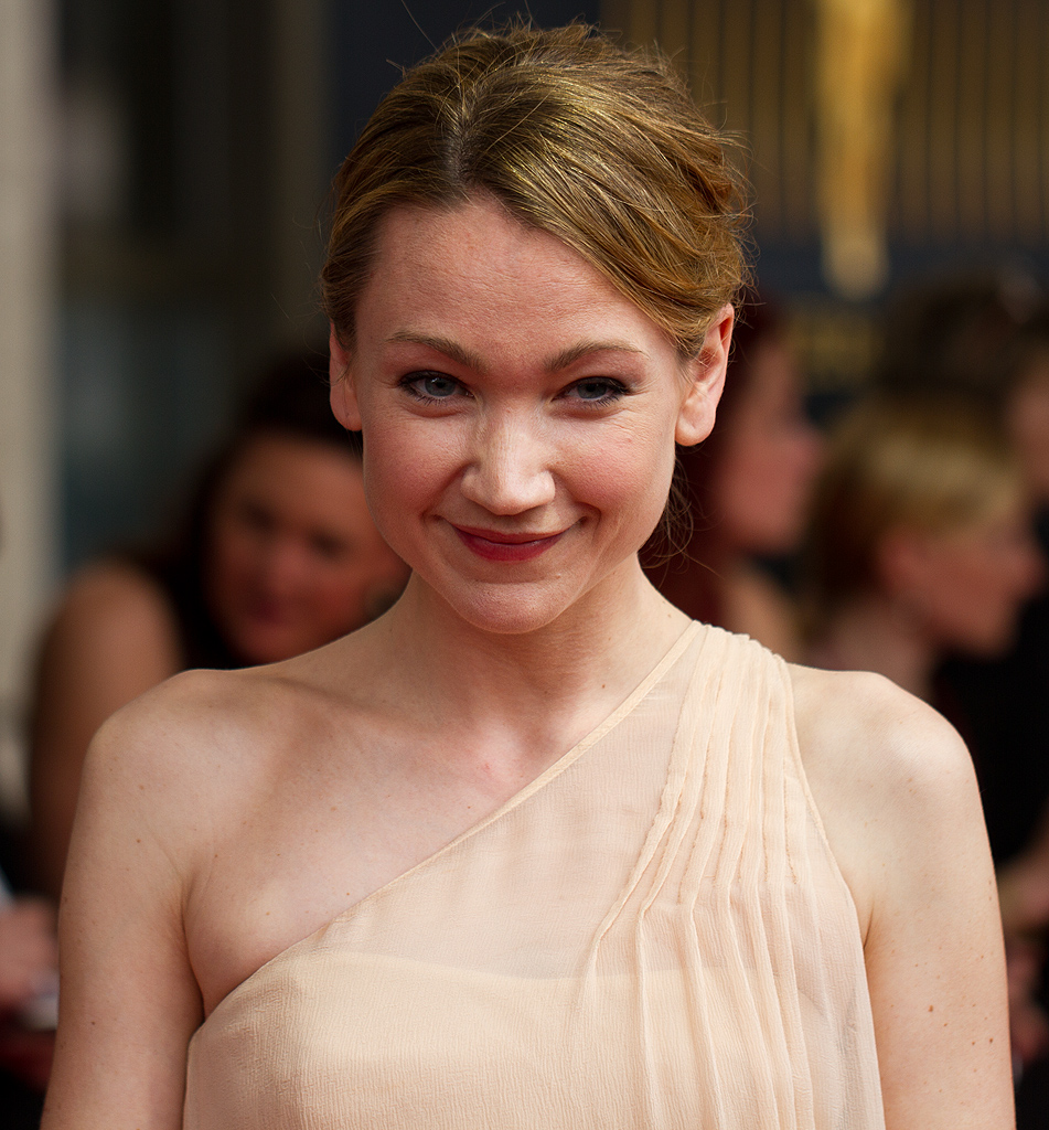 Lisa Marie Potthoff